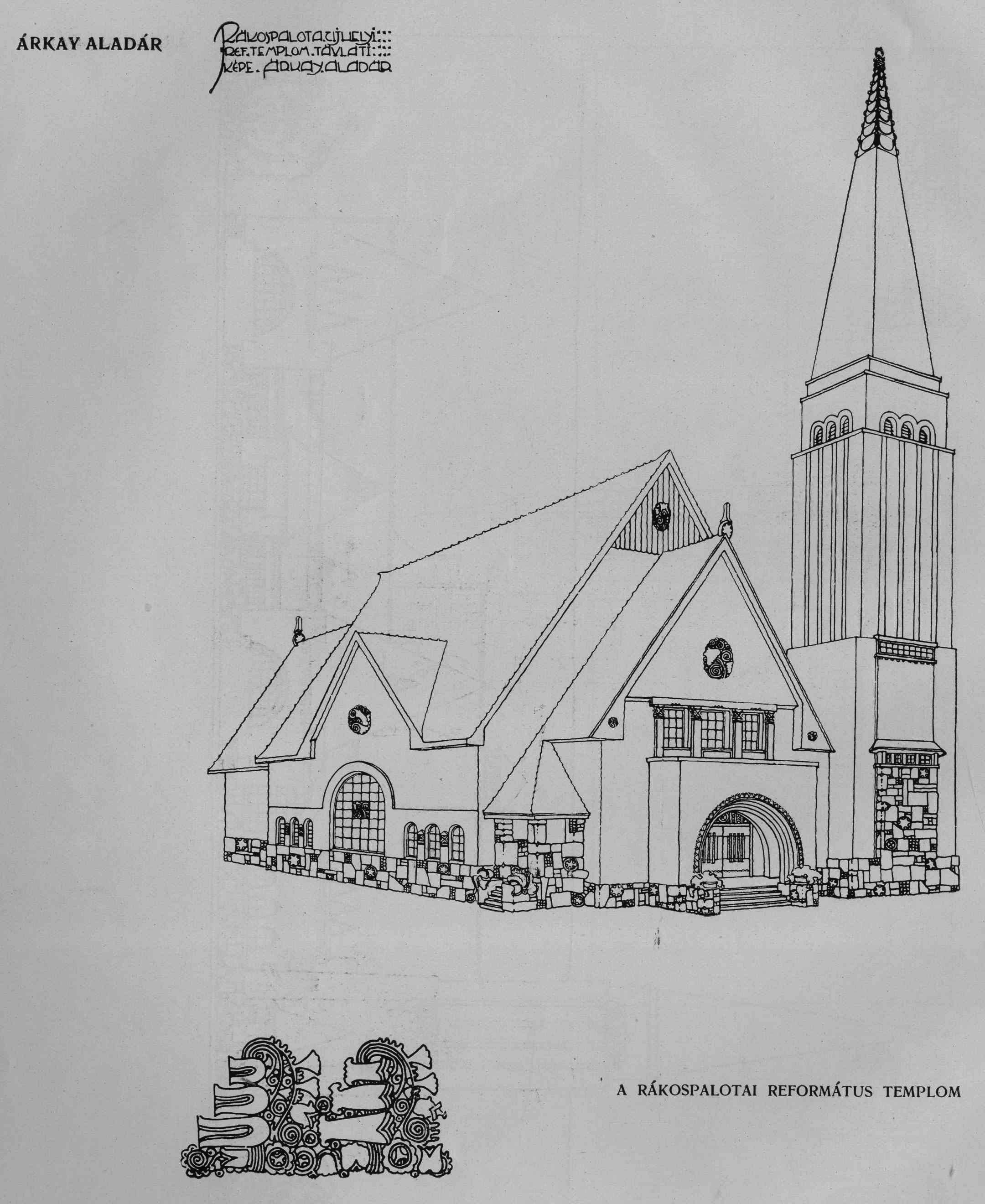 Árkay Aladár: Rákospalotai templom vázlat.